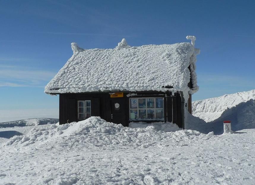 Post-office, Sněžka, Krkonoše, Czech Republic